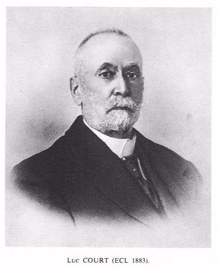 Luc COURT, ingénieur de l'Ecole Centrale de Lyon (ECL'1883) et constructeur automobile.